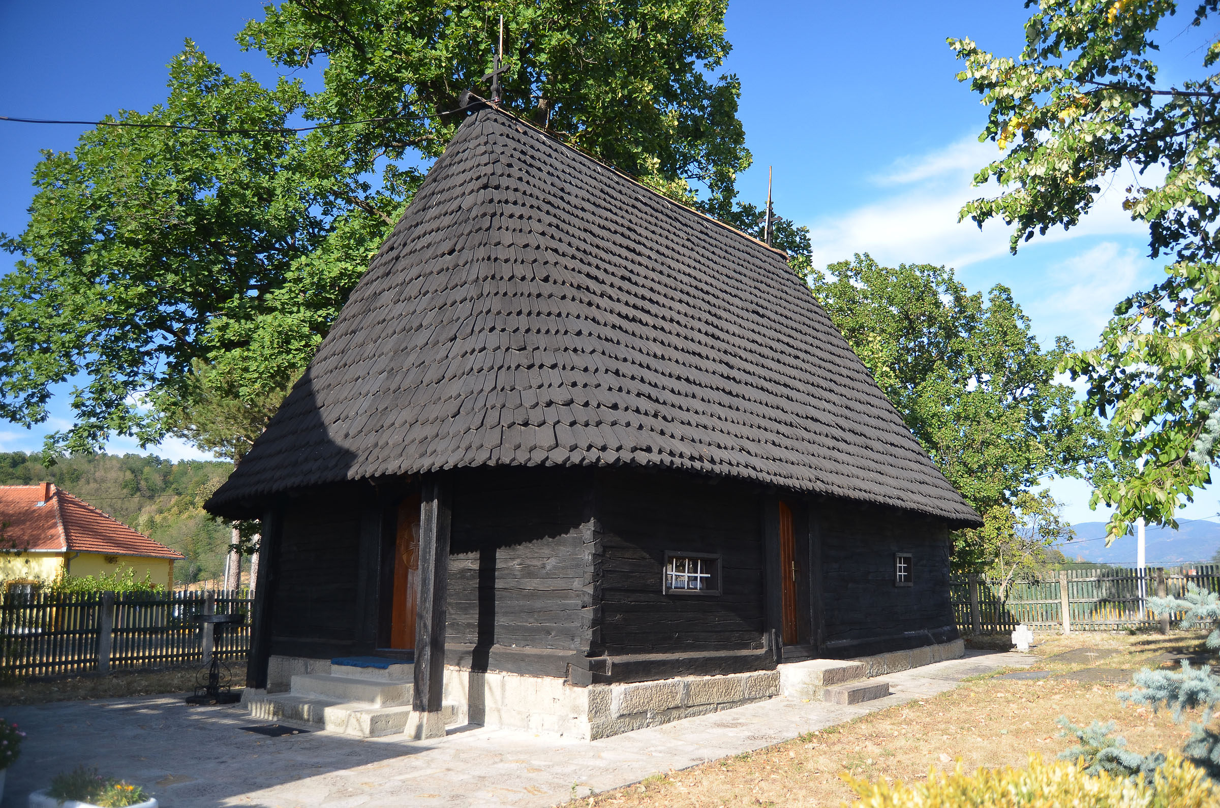 Црква брвнара у Љутовници, поглед са југозапада. Подигнута је 1809. године. Првобитно је била посвећена арханђелу Михаилу, док данас слави Пренос моштију светог Николе.